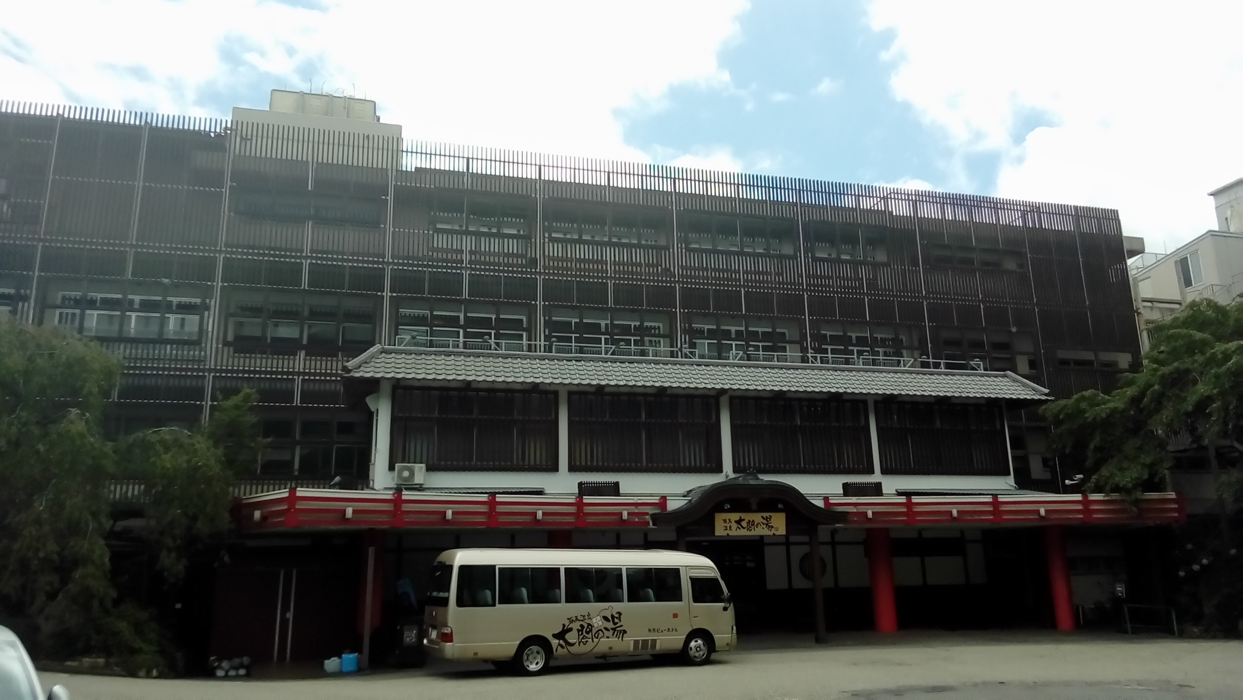 太閤の湯（神戸市北区有馬町）